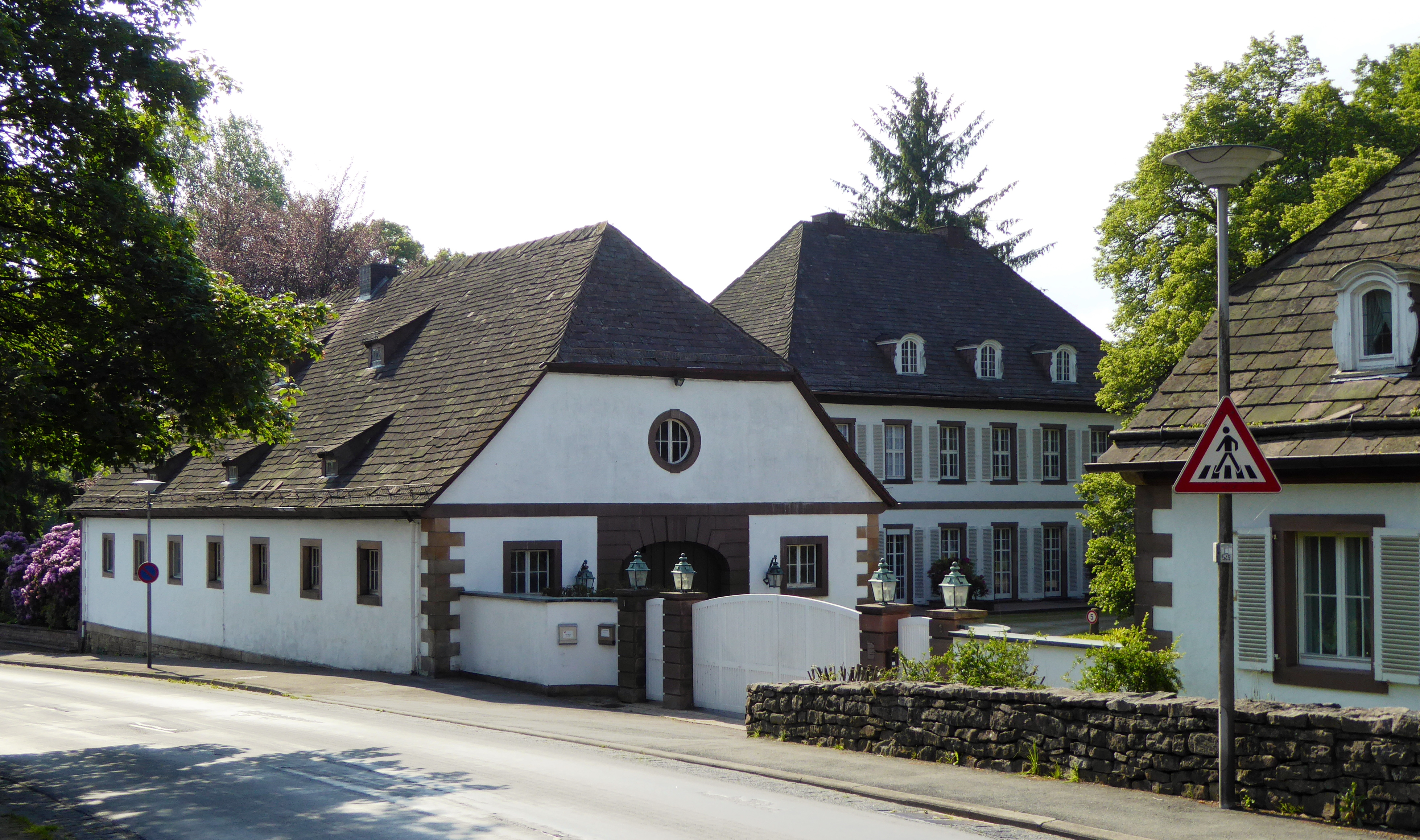 Ehemaliges Jagdschloss in Neuhaus im Solling, Stadt Holzminden, Südniedersachsen. Erbaut 1791